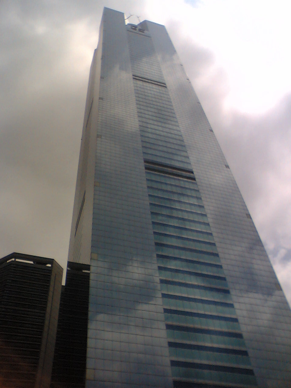 中信广场